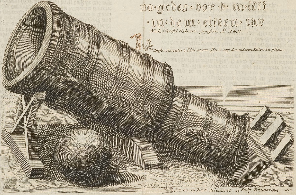 Die Faule Mette in Braunschweig.